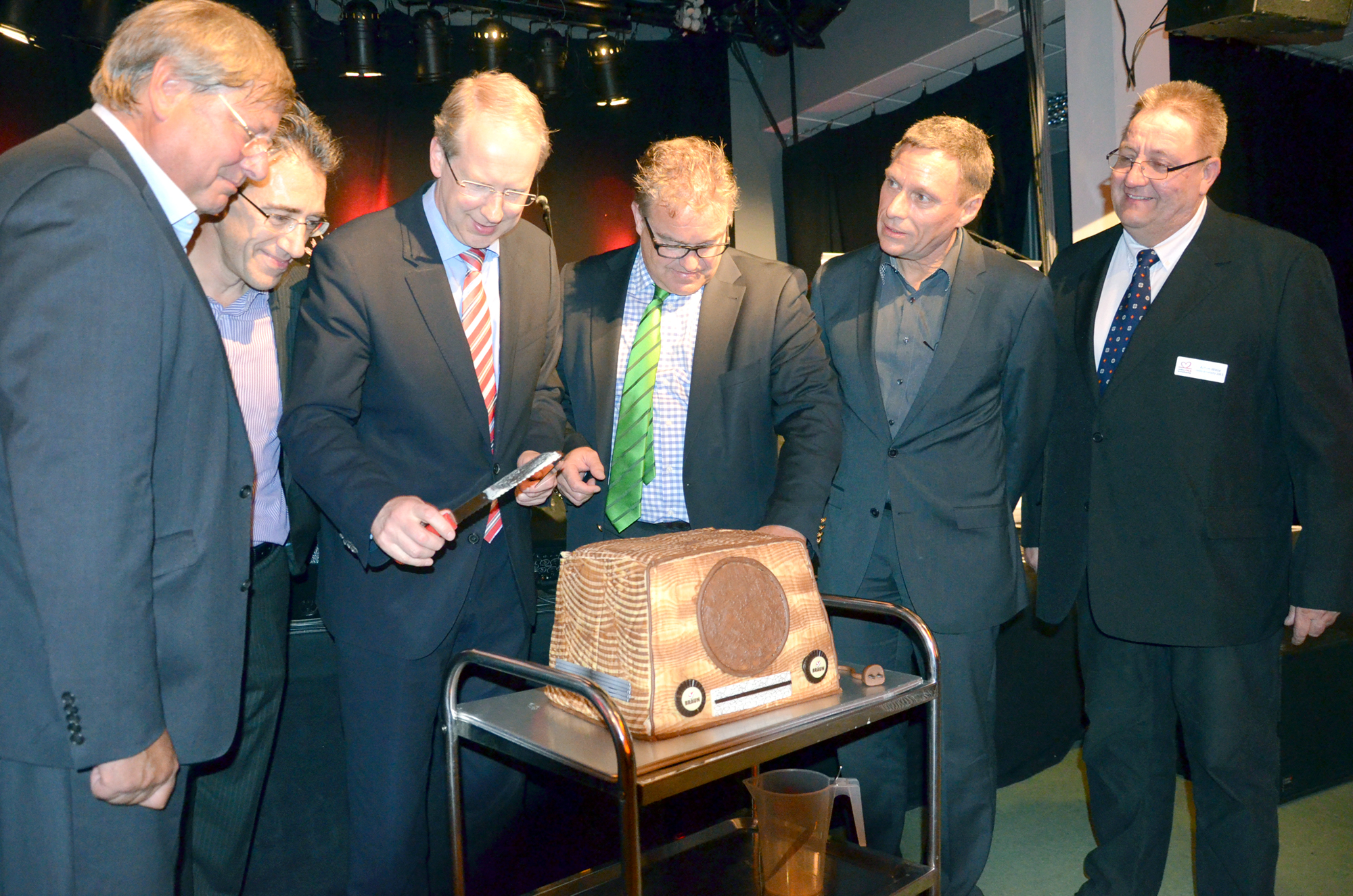 Eine Überraschung auf der Jubiläumsfeier im Kulturzentrum Pavillon in Hannover zum "5. Geburtstag" des Mitmach-Senders radio leinehertz 106.5 war der Geburtstagskuchen in Form eines alten Radios der Marke Braun, hier kurz vor dem Anschnitt durch Oberbürgermeister Stefan Schostok ...